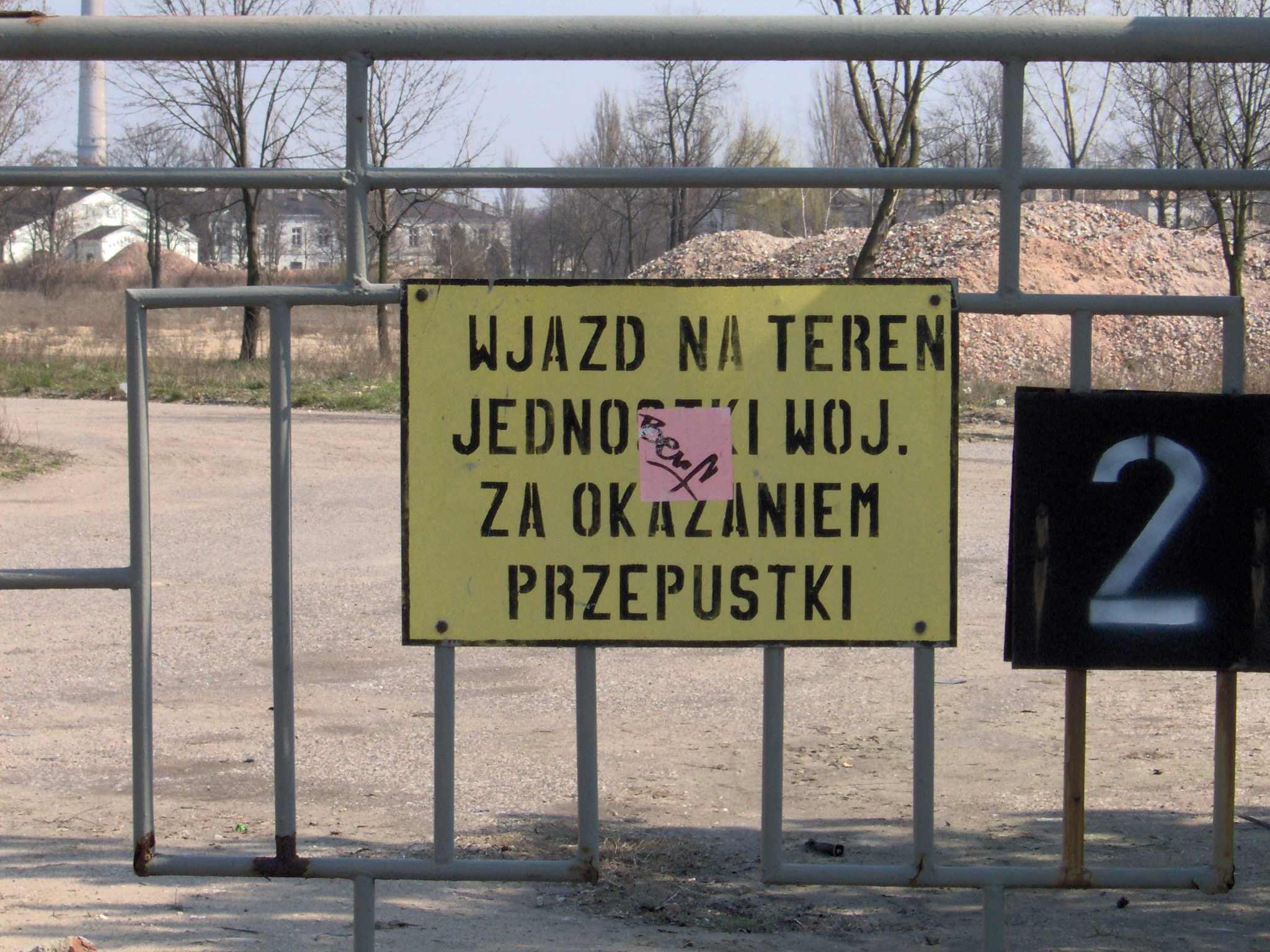 Pozostałości po bramie wjazdowej do byłej jednostki wojskowej przy ul. Żytniej 83 (brama od ul. Wojskowej - 2007 r.)